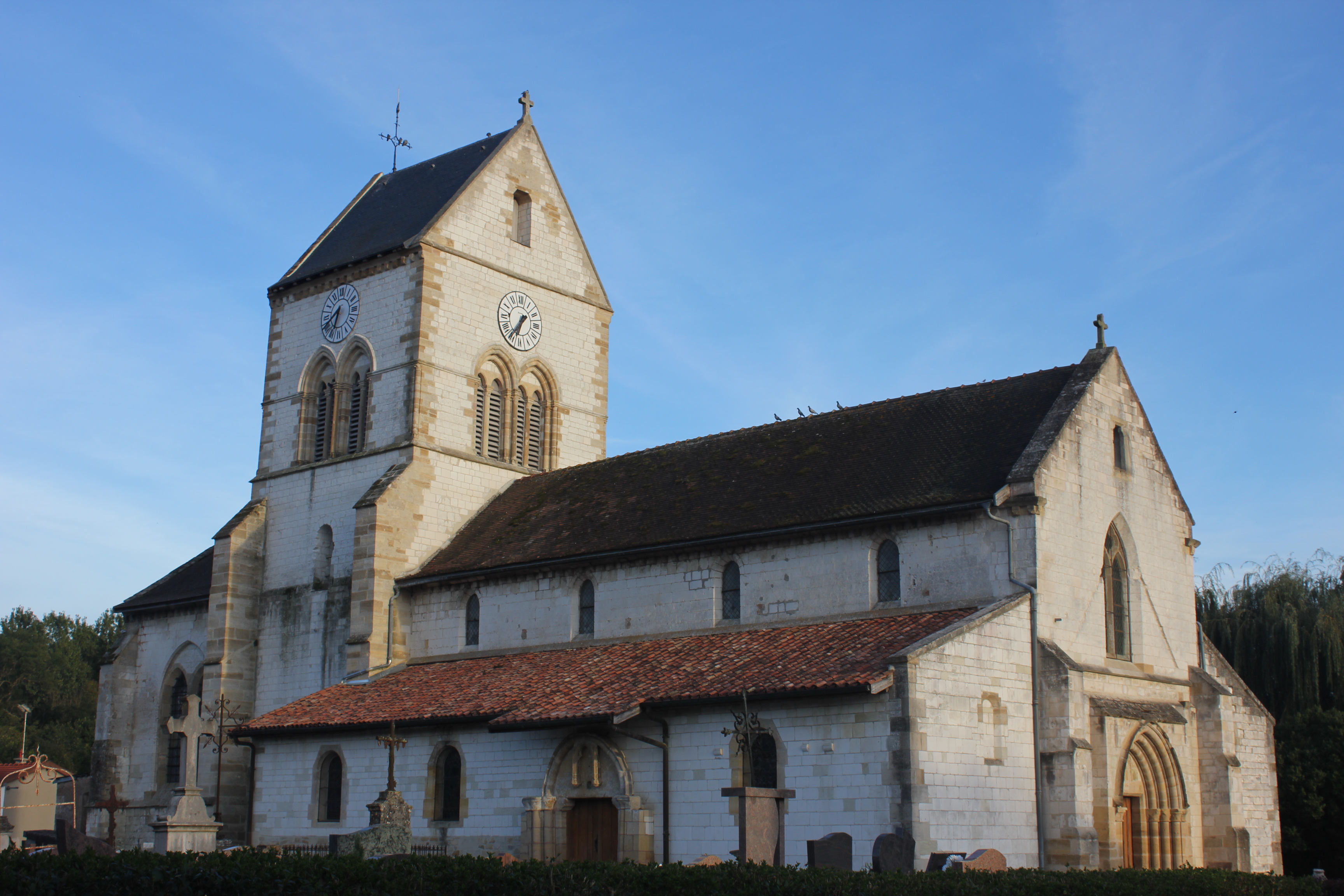 L'église Saint-Maurice d'Heiltz-l'Évêque (département de la Marne).